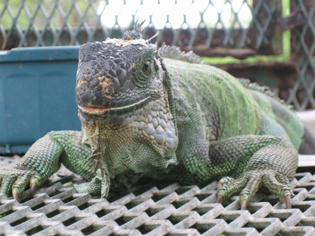 Zdjęcie przedstawia Iguana. (Iguana iguana), Florida